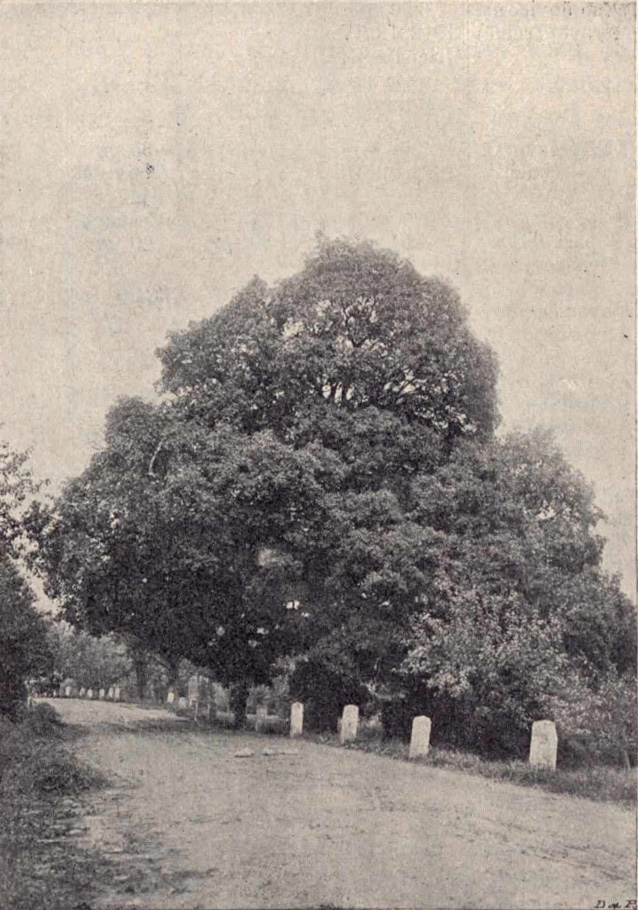 Babyka u Potštejna, památný strom zaniklý roku 1940, snímek kolem roku 1900.